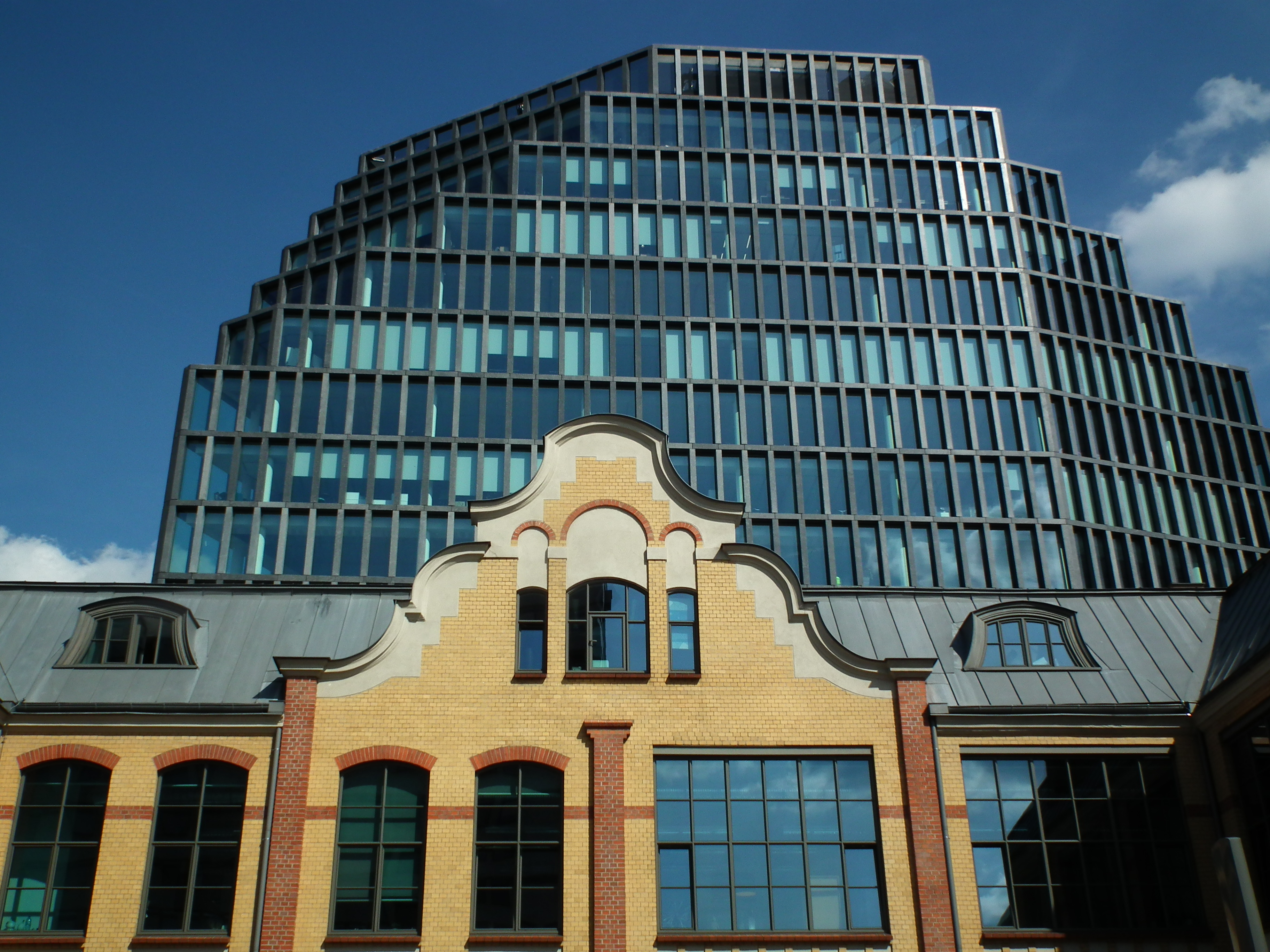 22 Roosevelta Street in Poznań. Nowy Bałtyk.